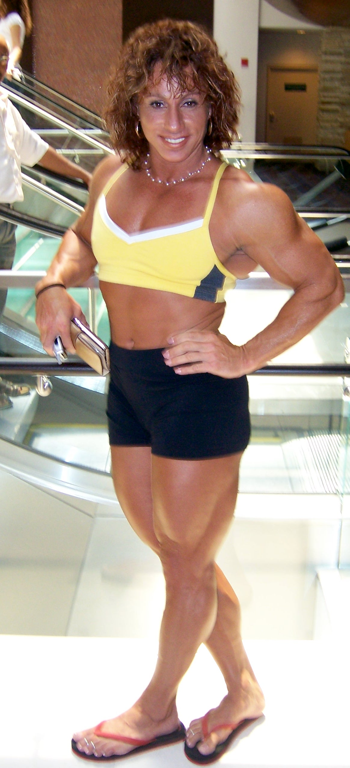 Annie Rivieccio